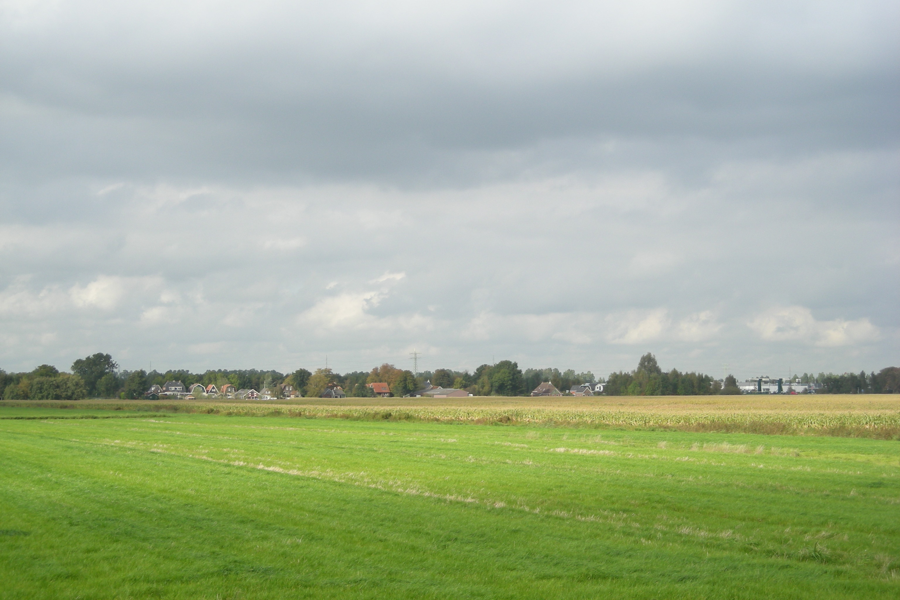 plaats Nijehaske bij Heerenveen